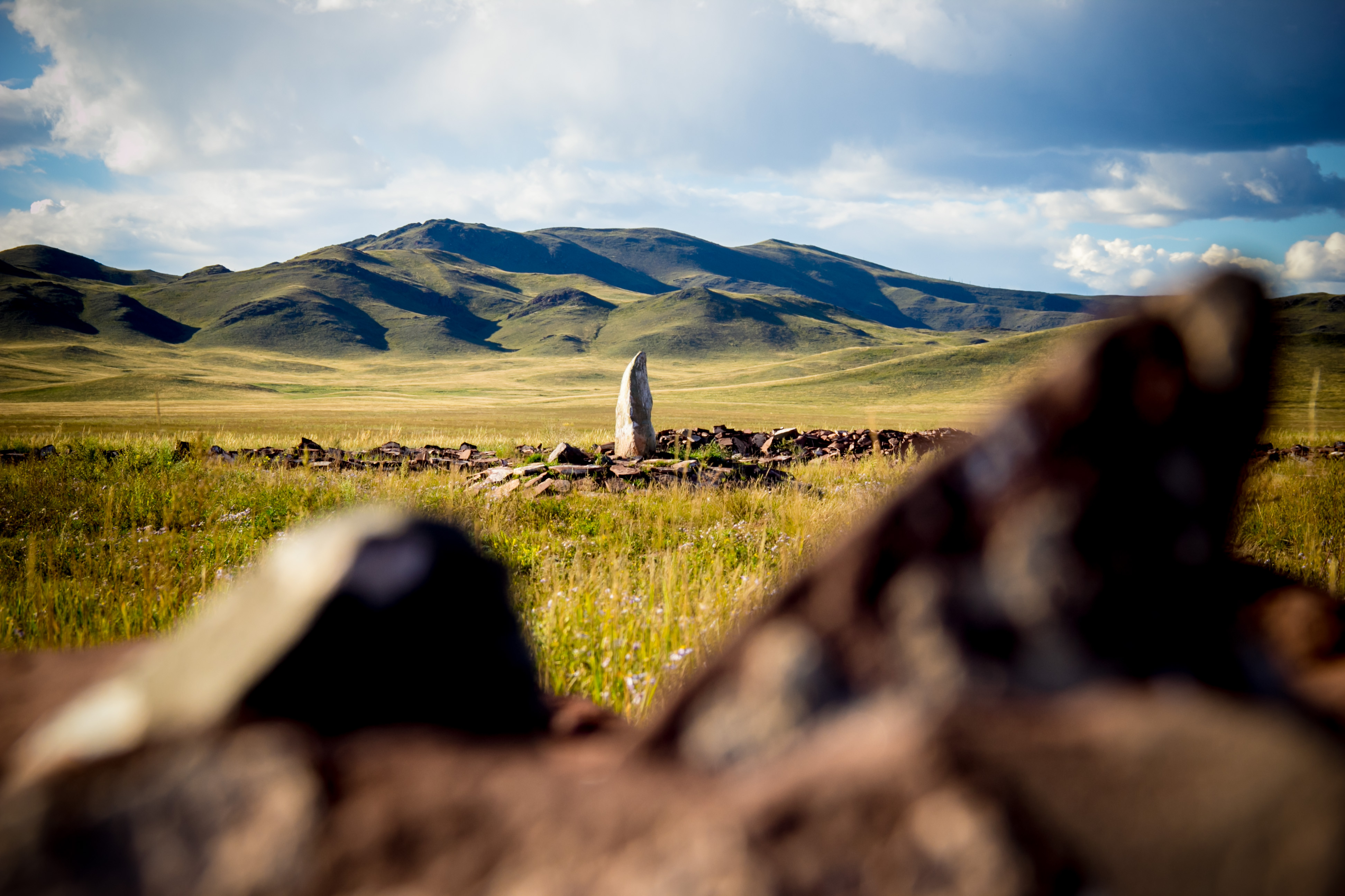 Легендарная археологическая находка нового столетия на территории Республики Тувы — курган Аржаан-2. Основным важным открытием в 2001 году стало «царское» захоронение, которое осталось не потревоженным благодаря своему расположению, не в центре кургана, а у его края. В этом захоронении находились останки двоих людей — мужчины и женщины погребальное убранство было богато украшено золотом.